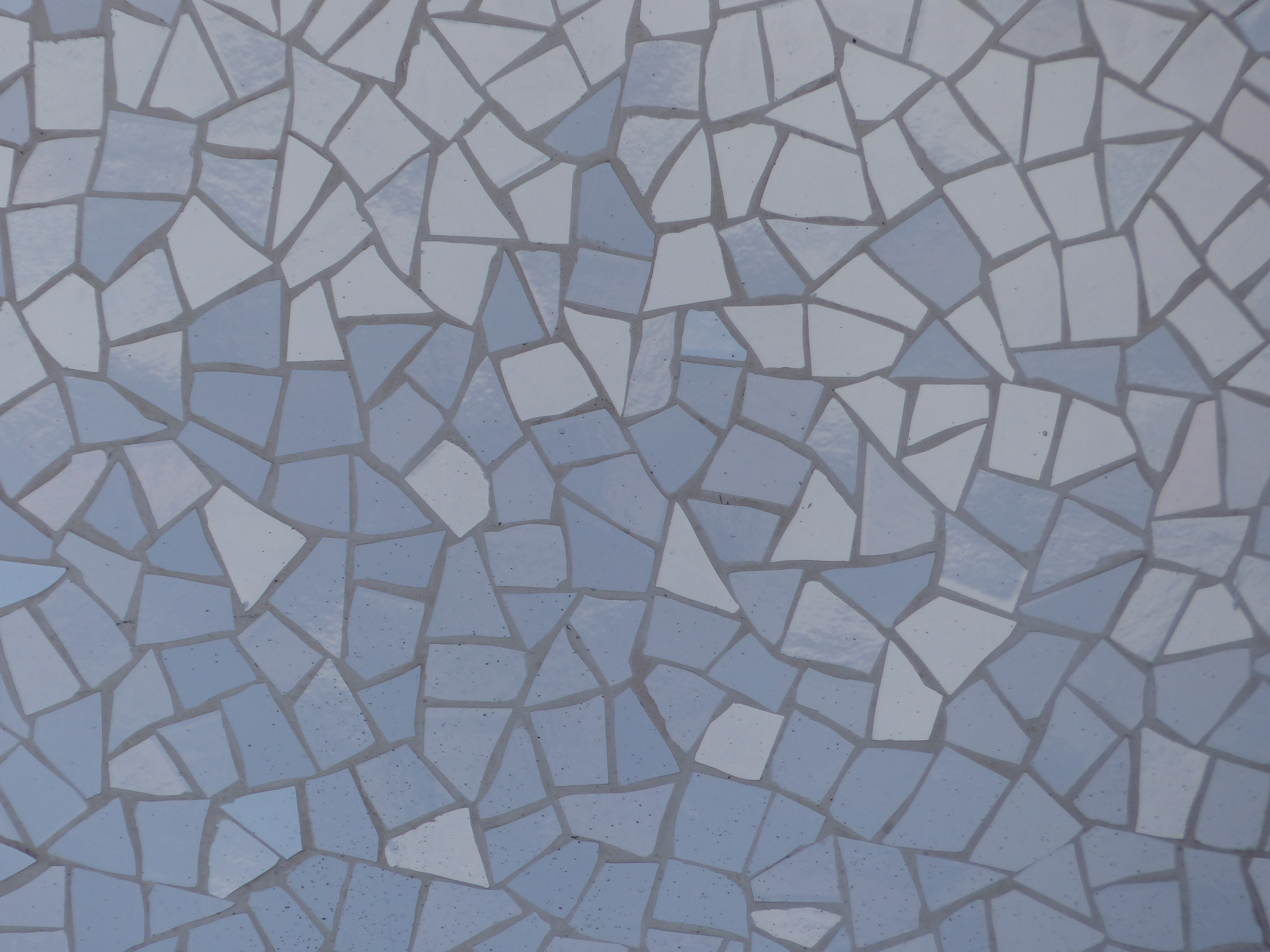 Auditorio de Tenerife, azulejos.